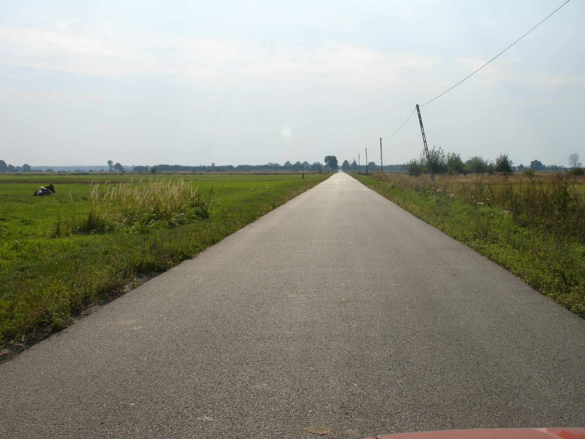 Droga prowadząca do wsi Chmielarze (z Garnku)